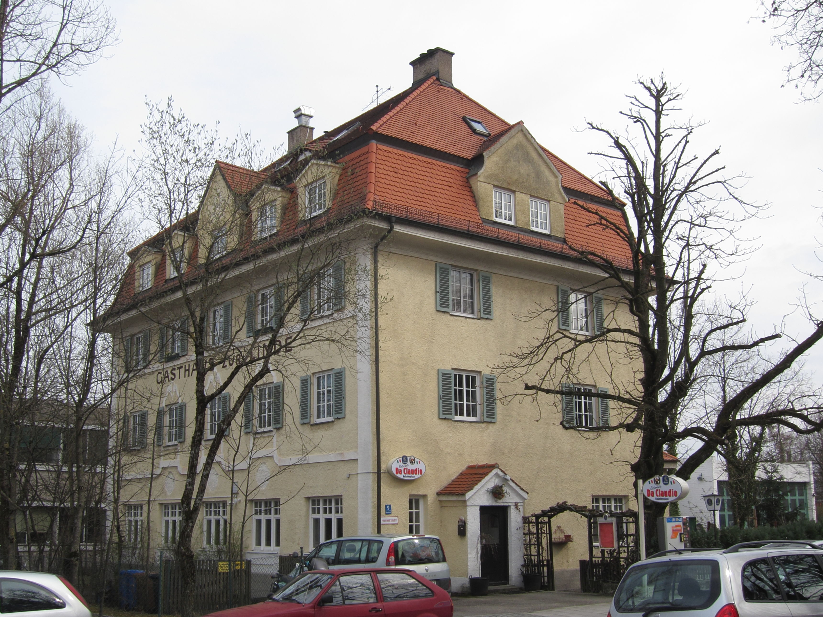 Baumbachstraße 9; ehemals Gasthaus zur Linde, barockisierender Mansarddachbau, 1912 von den Gebrüdern Ott.